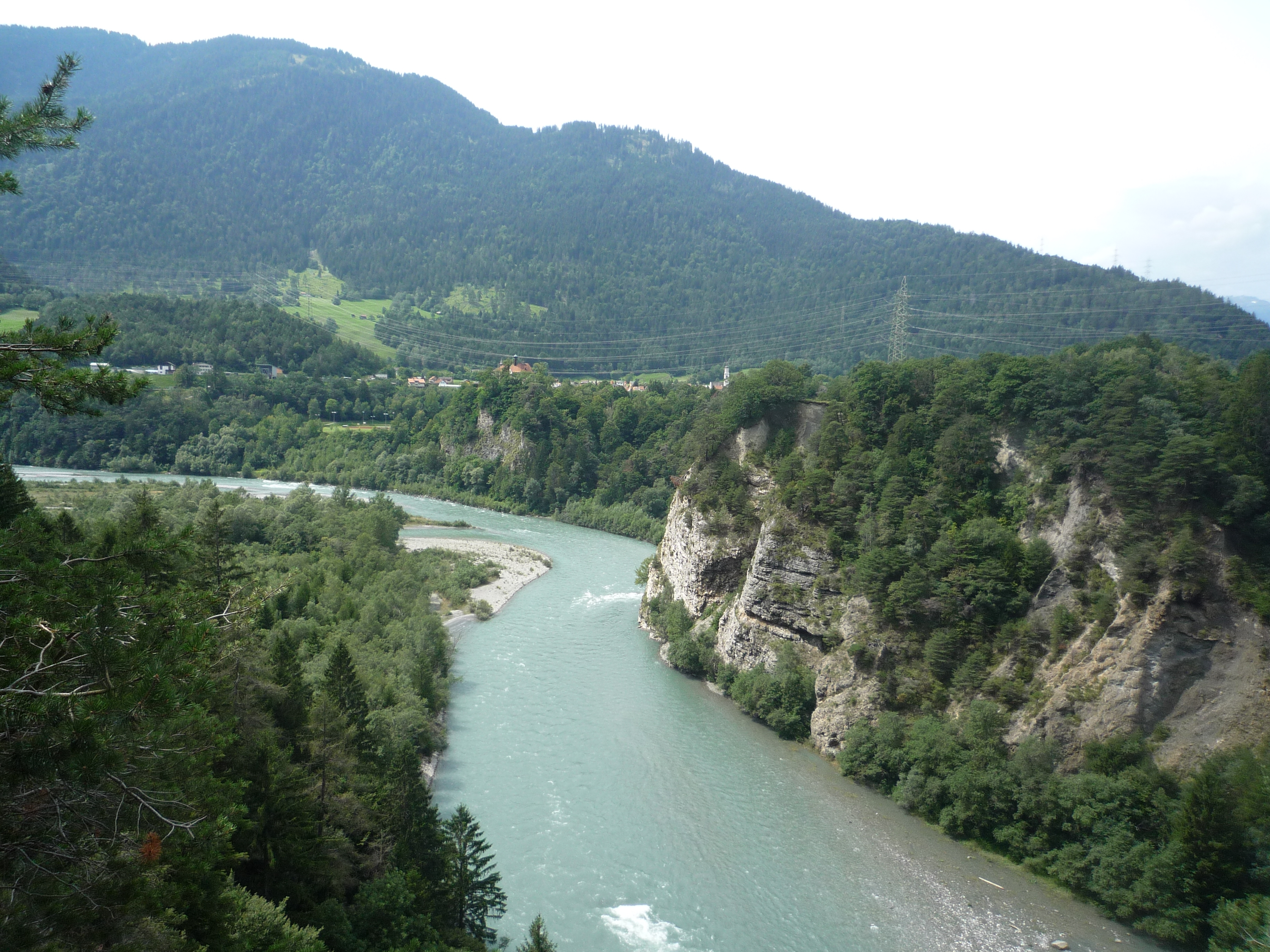 Rhäzüns. Taken in Bonaduz, Canton of Graubunden